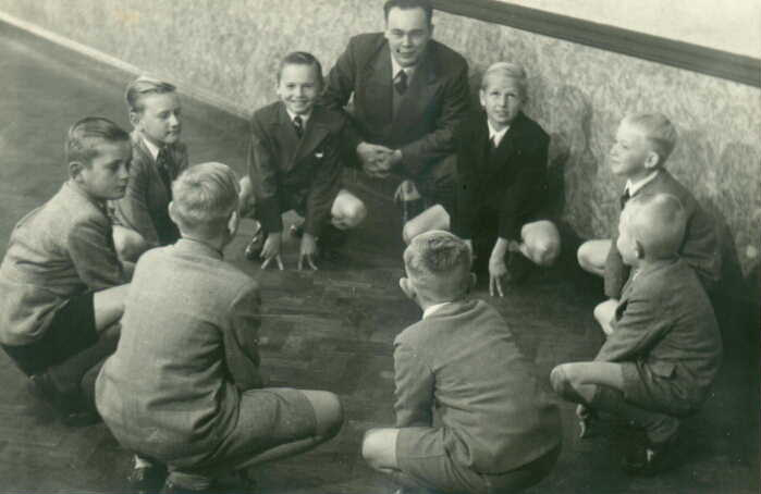 Grupo scouts de los niños estonios de la sociedad de los estonios de Buenos Aires, Argentina. Fue jefe scout por mucho tiempo el migrante estonio Allan Soonets Kippasto.